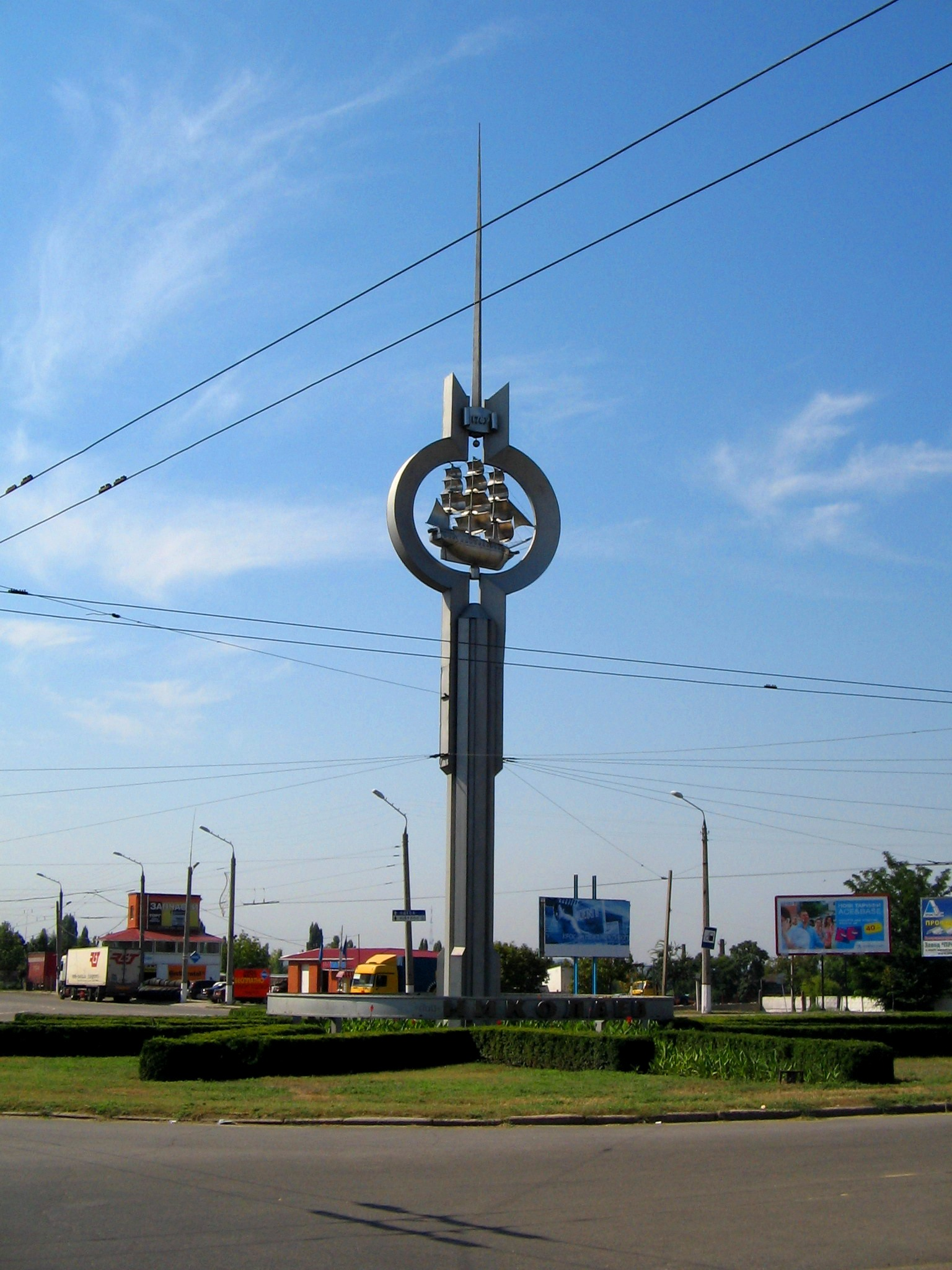 Шпиль при въезде в город Николаев (просп. Героев Сталинграда)